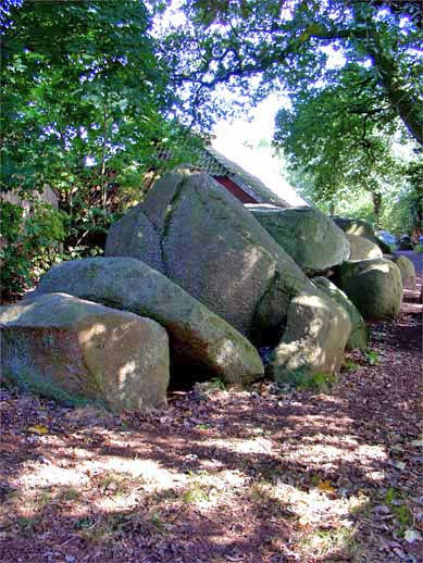 Hunebed D3 te Midlaren